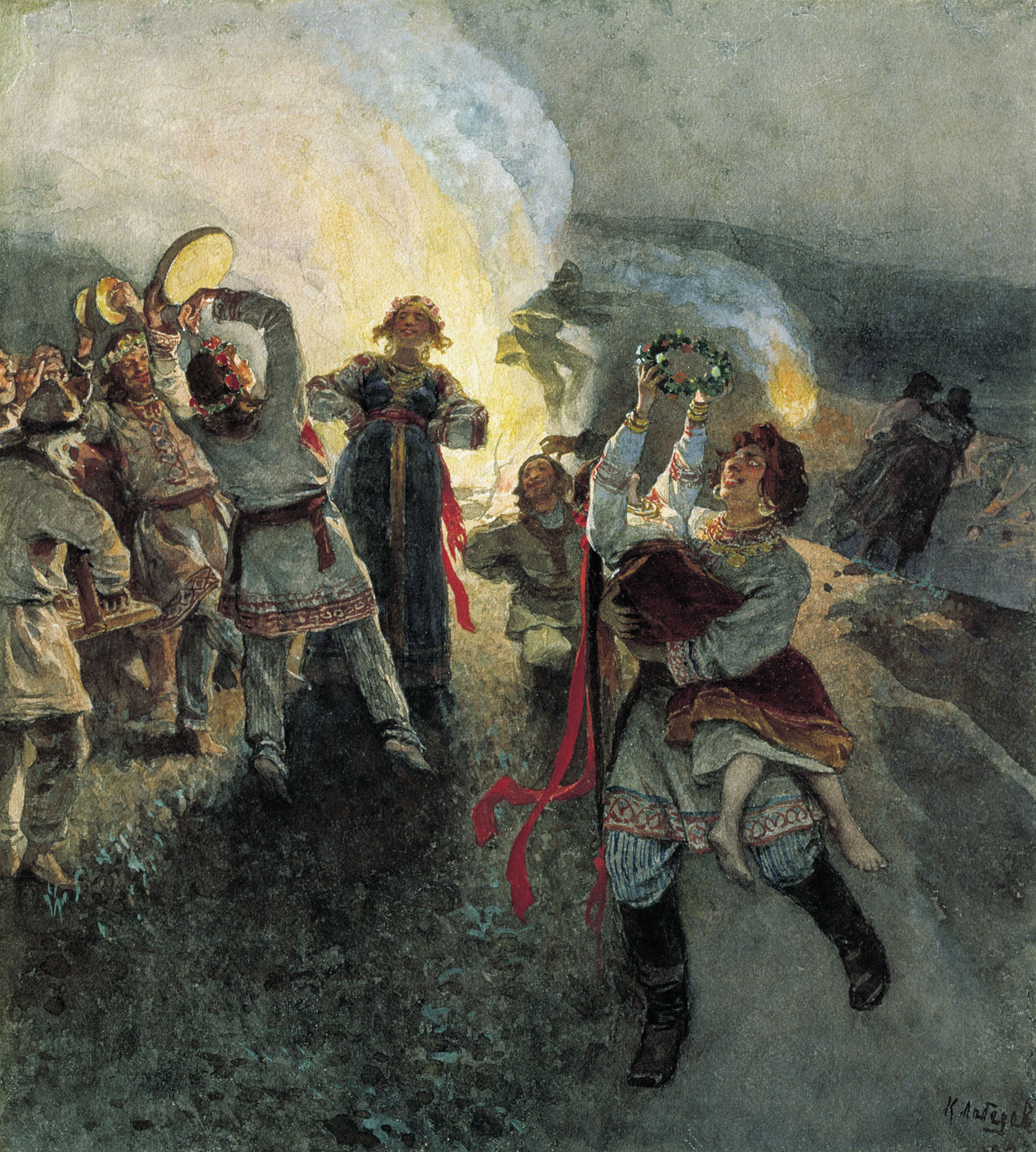 Ночь на Ивана-Купалу. Бумага, акварель. Ставропольский краевой музей изобразительных искусств, Ставрополь